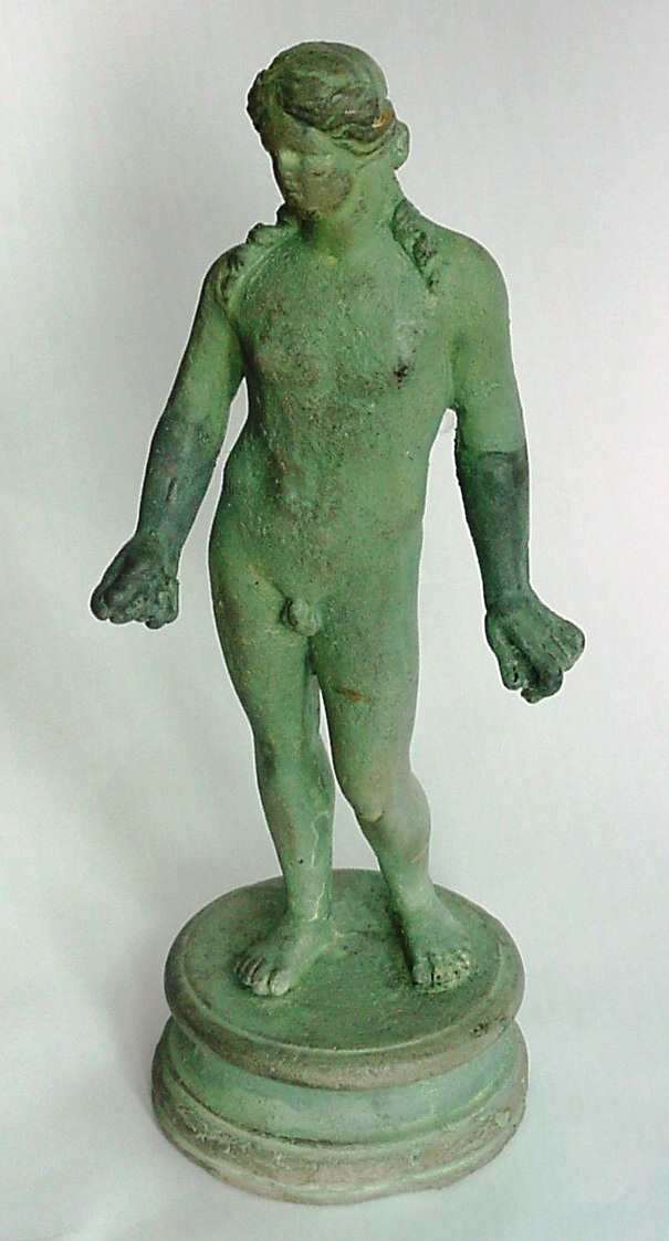 Statuette d'Apollon en bronze découverte en 1974, fabriquée à partir d'un moulage à la cire perdue. Exposée au Musée Historique et Industriel - Musée du Fer de Reichshoffen.